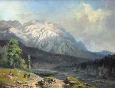 Henric Trenk - Muntele Negoiul (Peisaj din Munţii Carpaţi), ulei pe pânză, deţinător: Muzeul Naţional de Artă al României din Bucureşti.